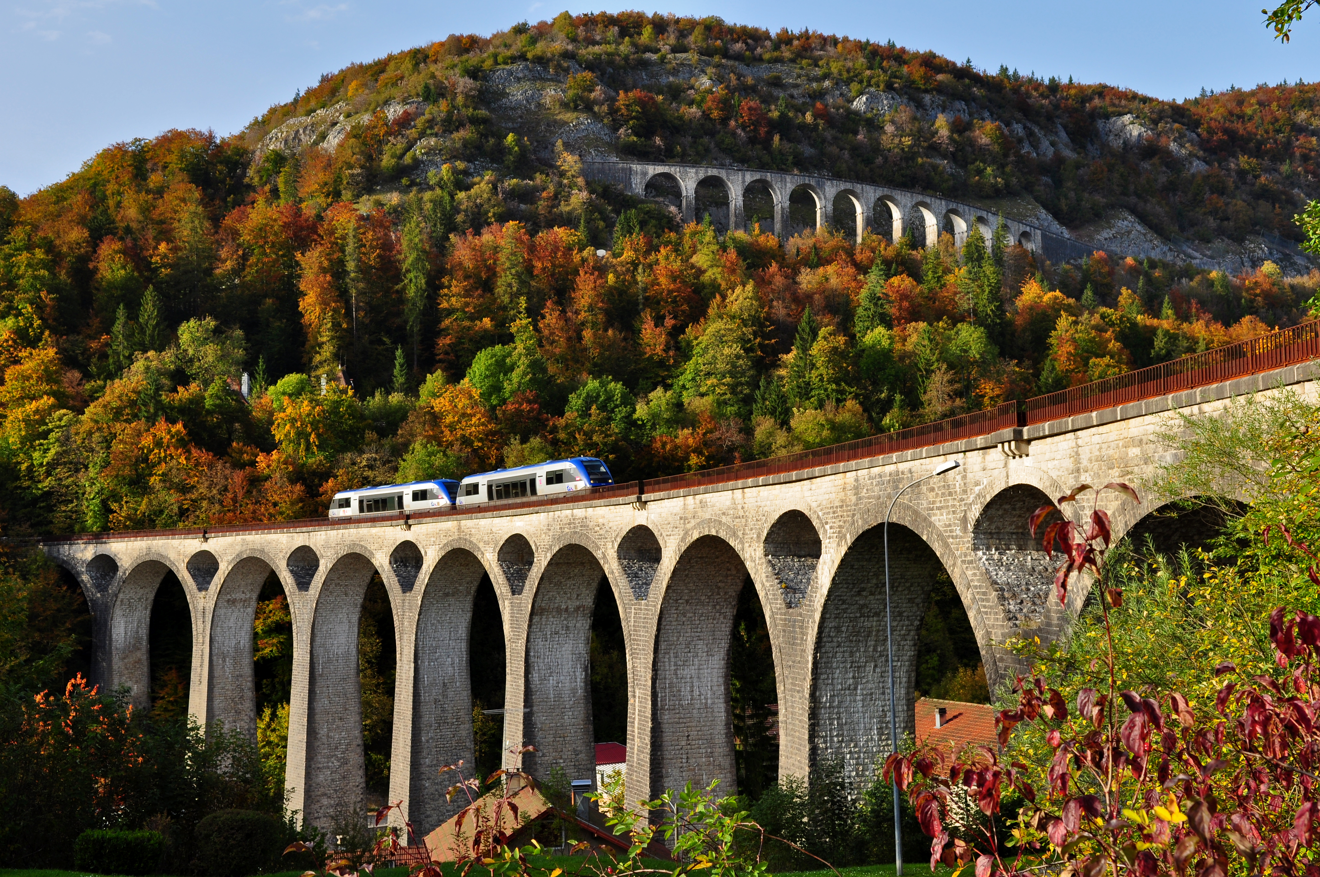 Vue sur le viaduc de l'Evalude et le viaduc des Crottes, à l'automne